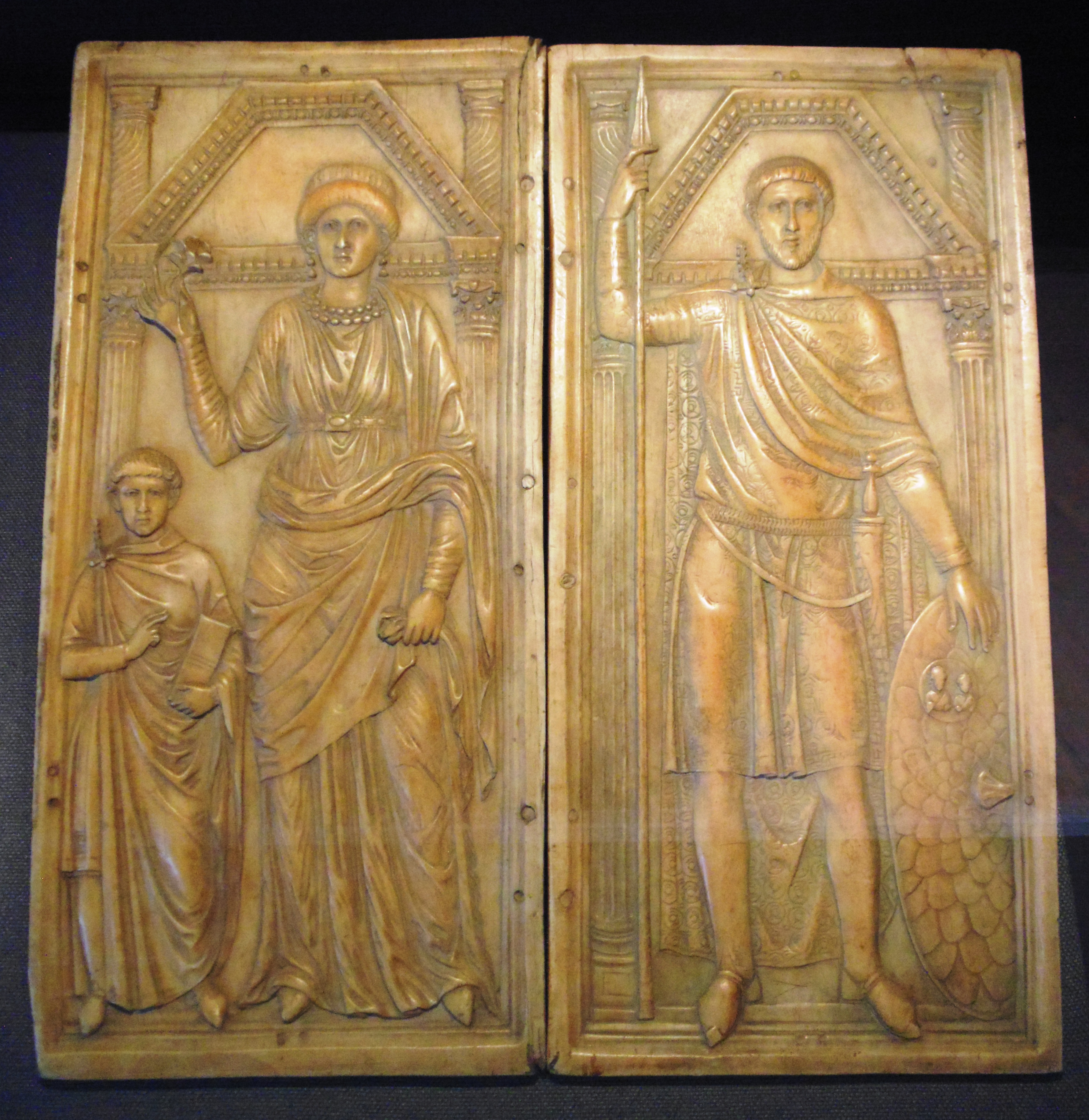 кістяний диптих із портретом Стіліхона